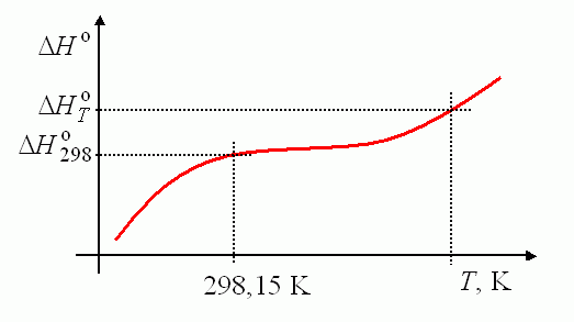 A képződési entalpia hőmérséklet-függése